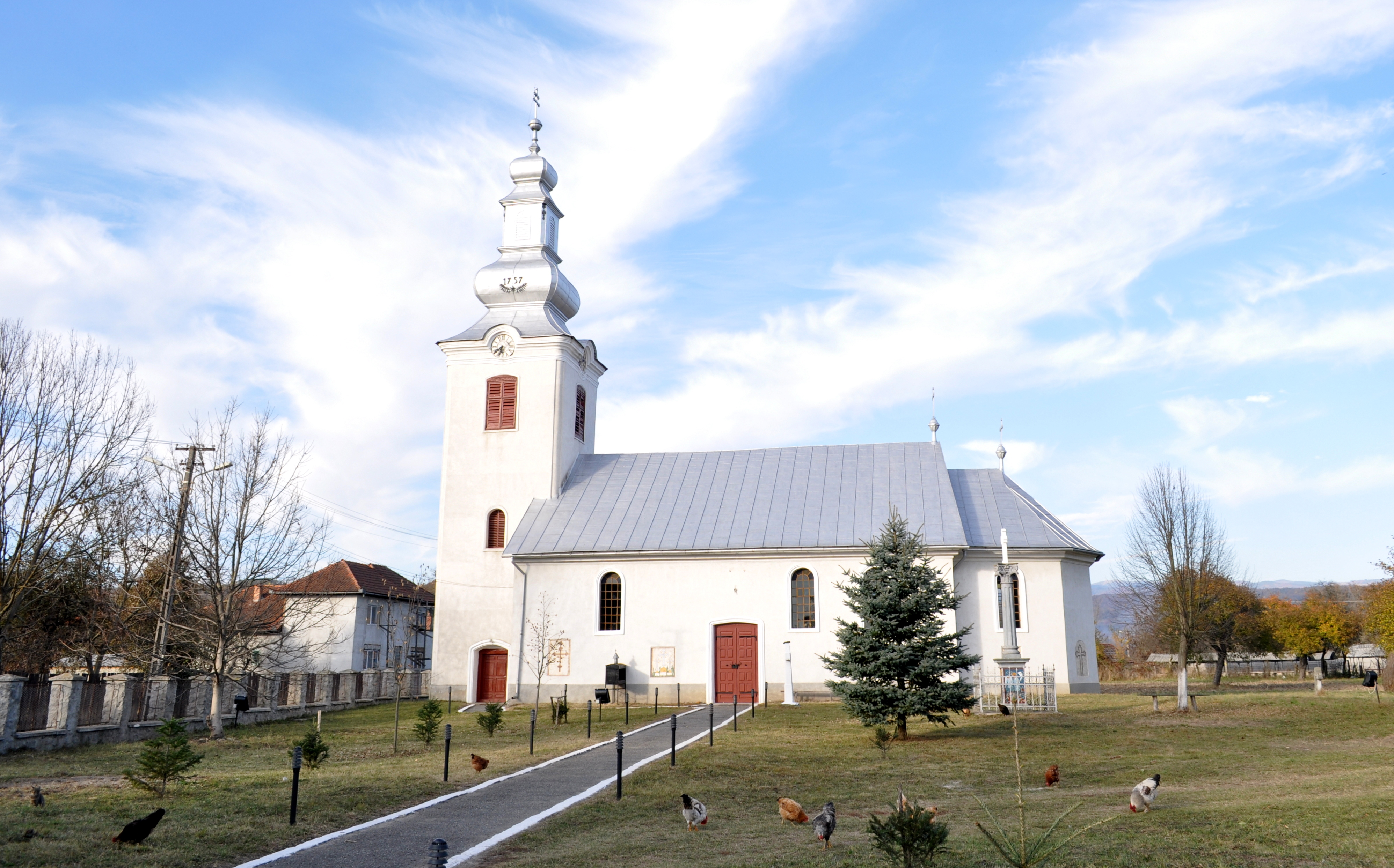 Biserica „Nașterea Născătoarei de Dumnezeu" din Hălmagiu, județul Arad